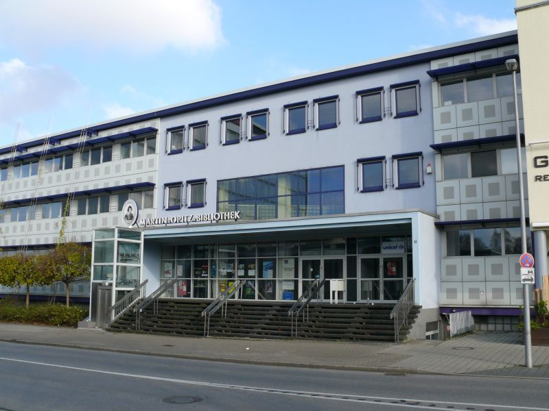 Martin-Opitz-Bibliothek, eigenes Bild